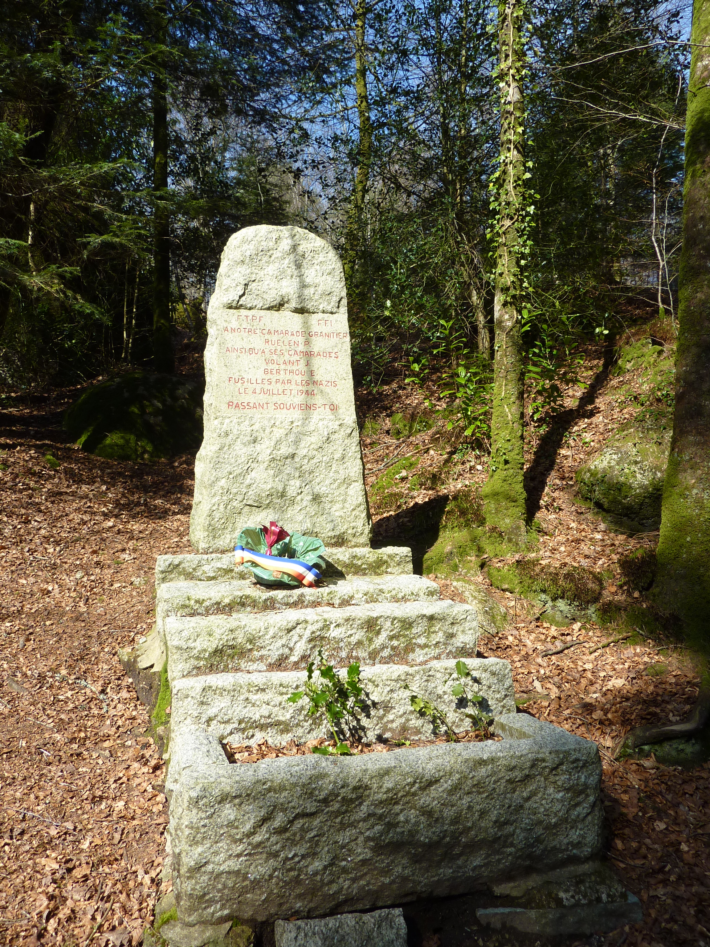 Monument commémoratif en l'honneur des résistants fusillés dans la forêt du Huelgoat en 1944